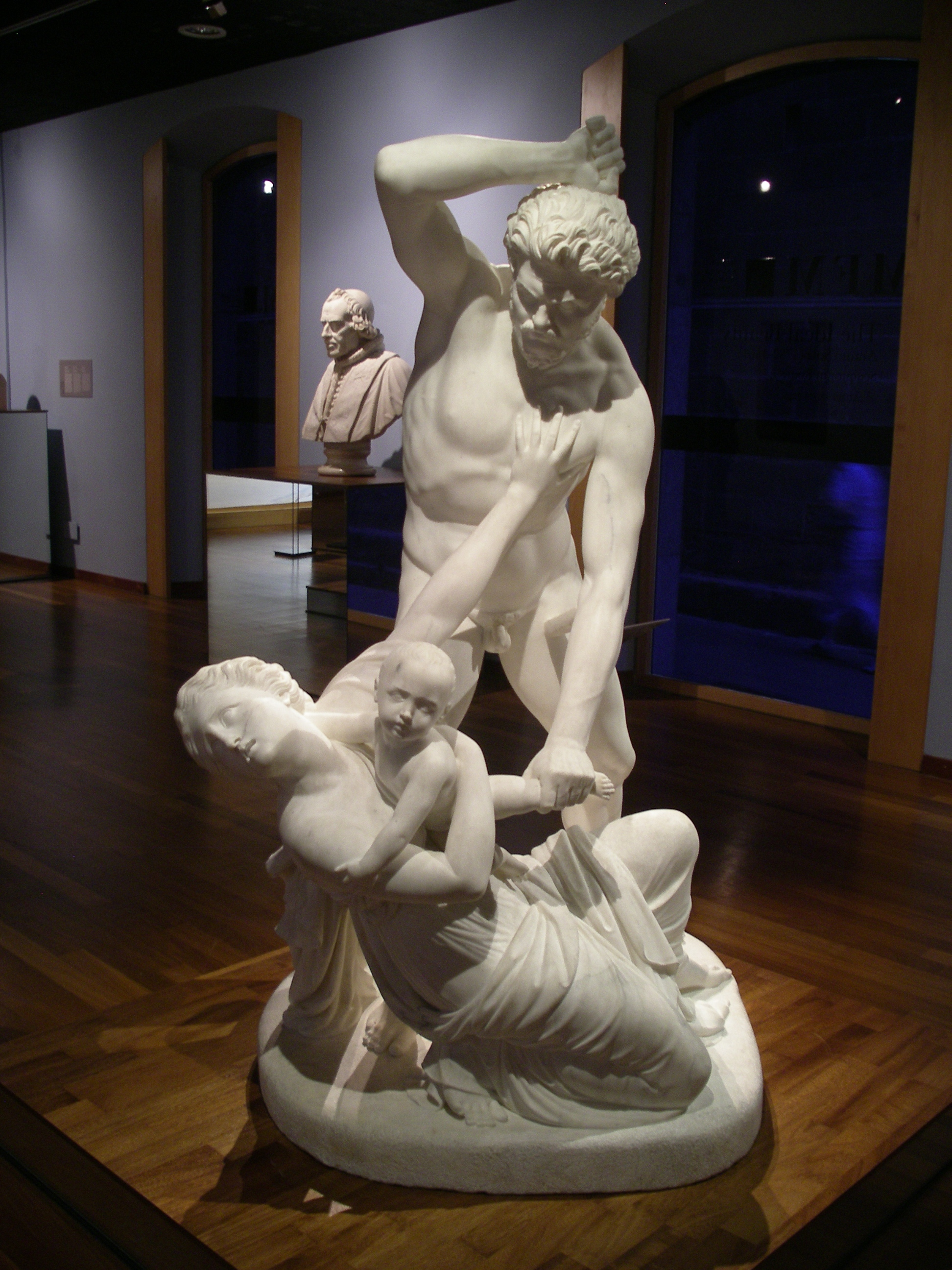 Matança dels innocents, per Antoni Solà (marbre, 158 x 90 x 97 cm), Reial Acadèmia Catalana de Belles Arts de Sant Jordi (inv. gen. 194 E), Barcelona.